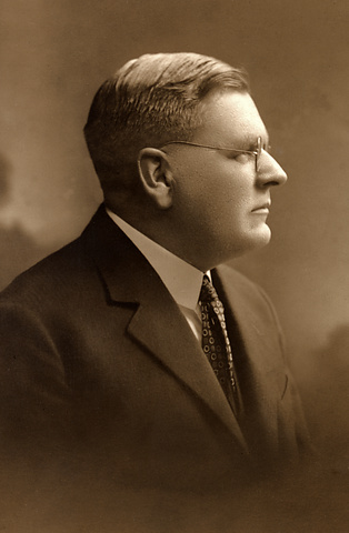 Josef Tvrdý (1877 - 1942), Český filosof a pedagog.